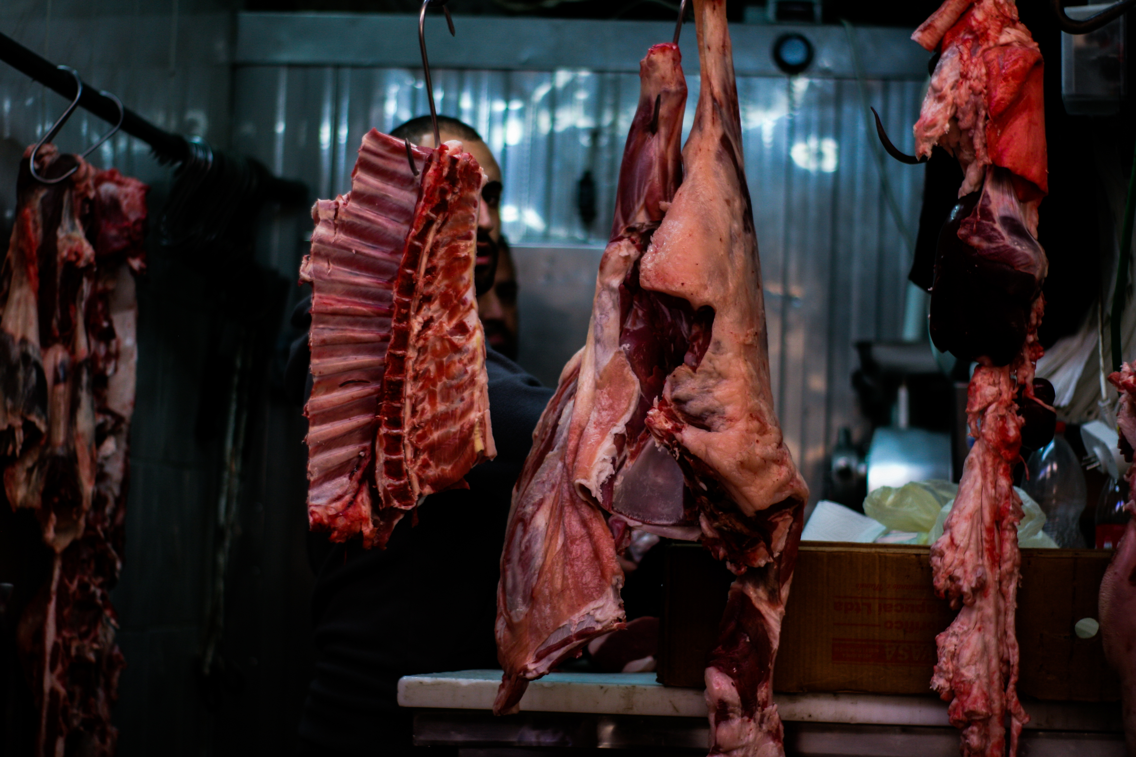 החלק העיקרי של חיה שמיועד לאכילה, הכולל רקמות שריר, איברים פנימיים ועוד. בבשר יש הרבה חלבון, שומן רווי, ברזל וויטמינים שונים כדוגמת B12 ומינרלים כדוגמת אבץ. קיימות סיבות שונות לאנשים שנמנעים מאכילת בשר, והם מכונים צמחונים ואף טבעונים (כינוי למי שלא אוכל מוצרים מן החי). התמונה צולמה בשוק נצרת, ינואר 2017.